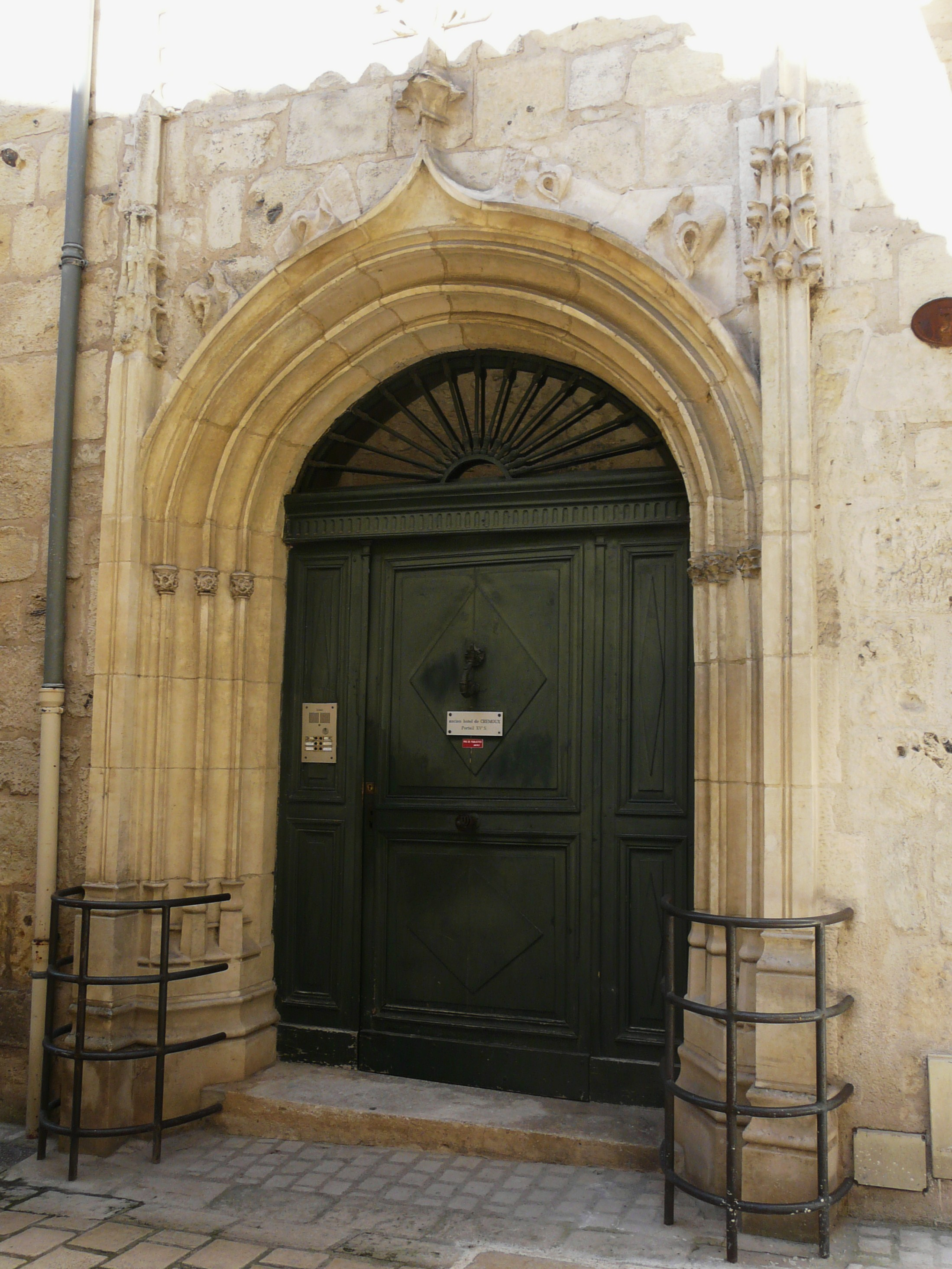 Le portail du XVe siècle de l'hôtel de Crémoux, 3 rue de la Constitution, Périgueux, Dordogne, France.